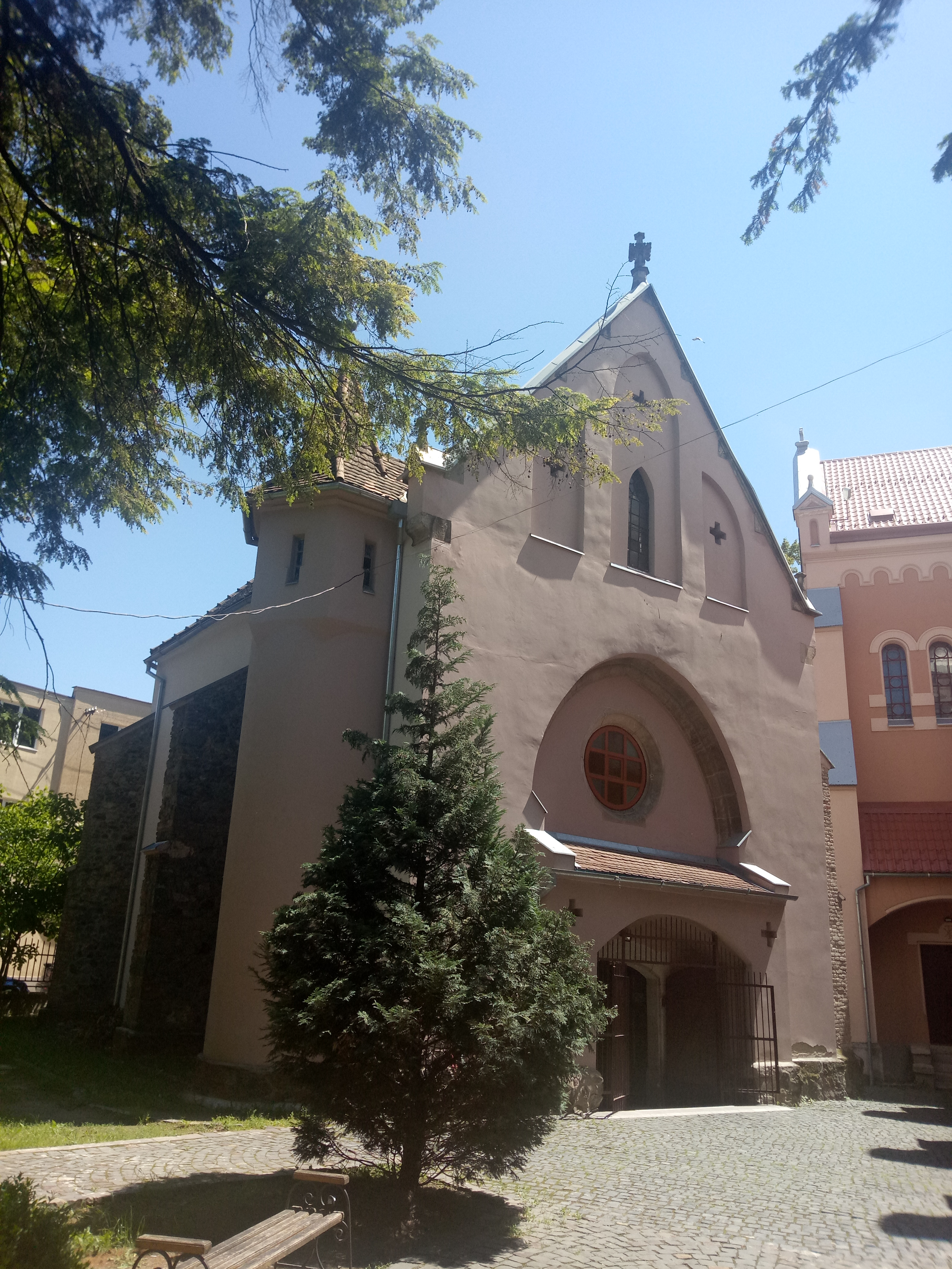 Мукачево_каплиця